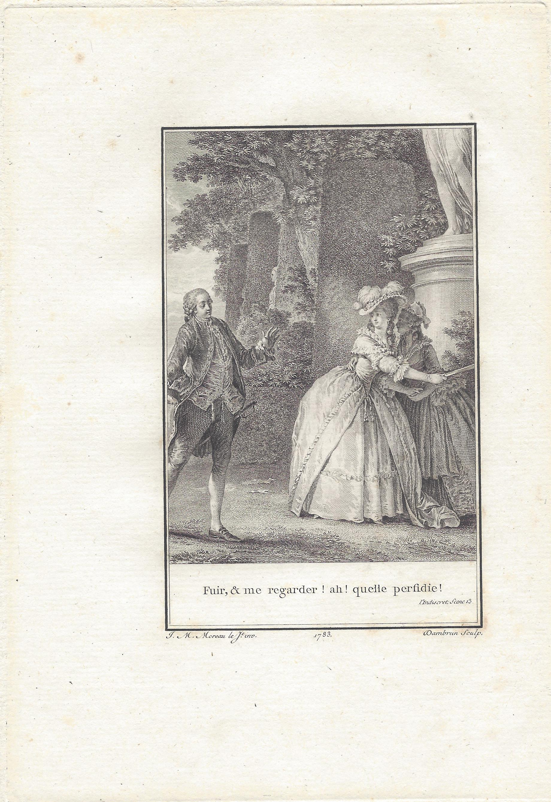 Voltaire: L'Indiscret Szene 13 Kupferstich von Jean Dambrun nach Jean-Michel Moreau